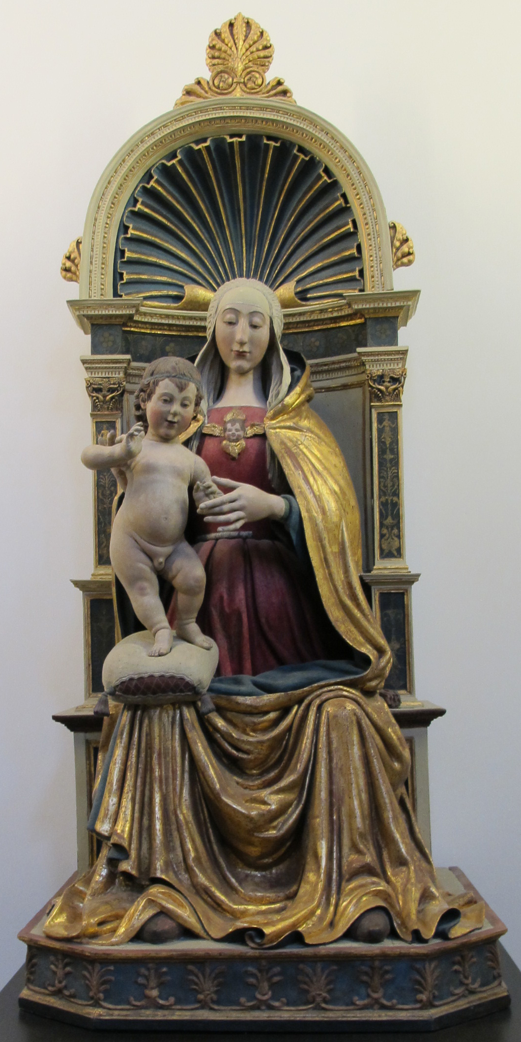 Silvestro dell'aquila (attr.) madonna in trono, 1470-1500 circa